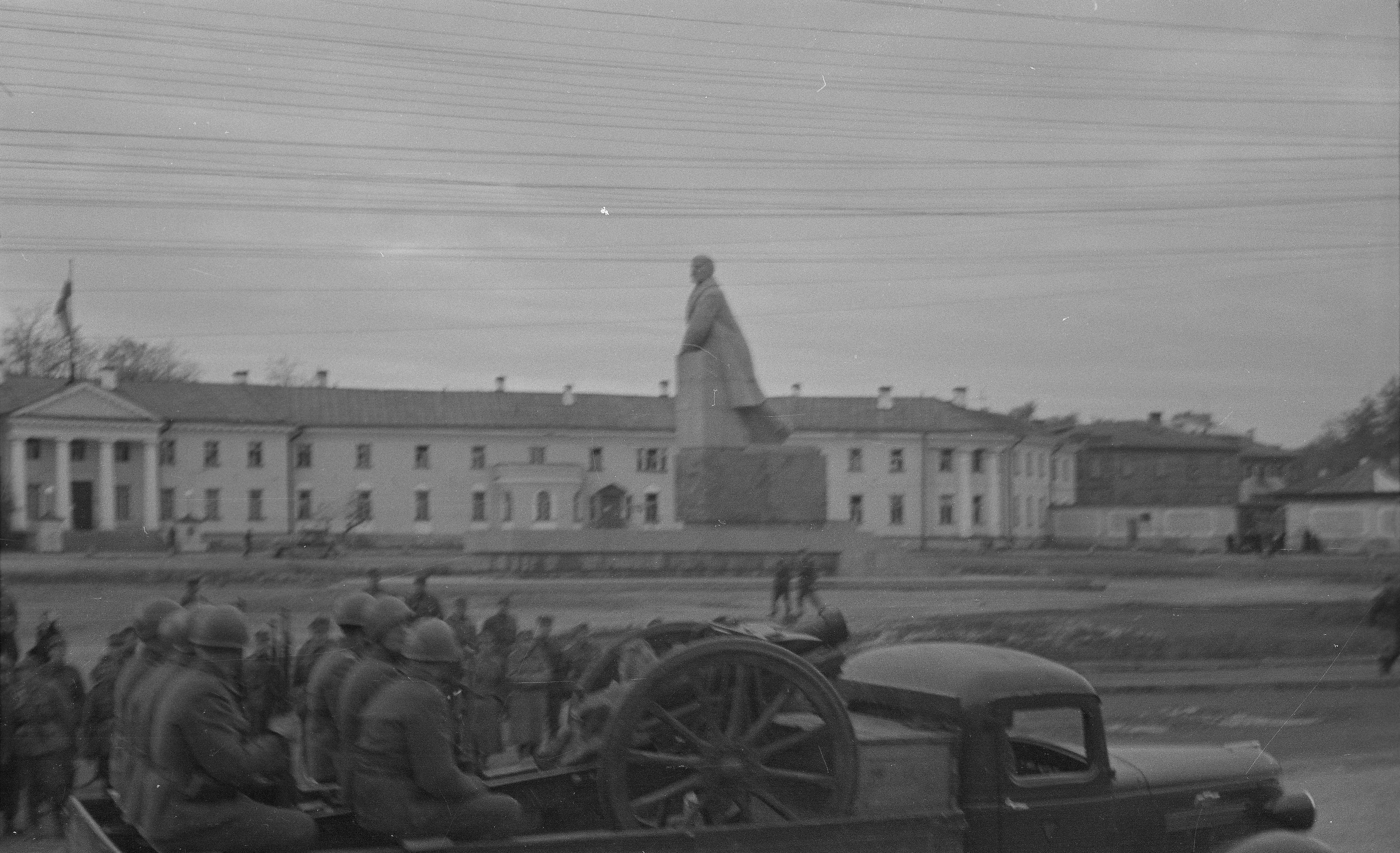 Äänislinnan valtausparaatissa vuorossa Kevyt Patteristo 11:n jaos. Patteristo sovelsi salamasodan hyökkäysliikkeessään puna-armeijan ohjesäännön mukaista 76 mm:n rykmentinkanuunan m/27 asennusta kuorma-autoon (Käkelä 2000, 292).